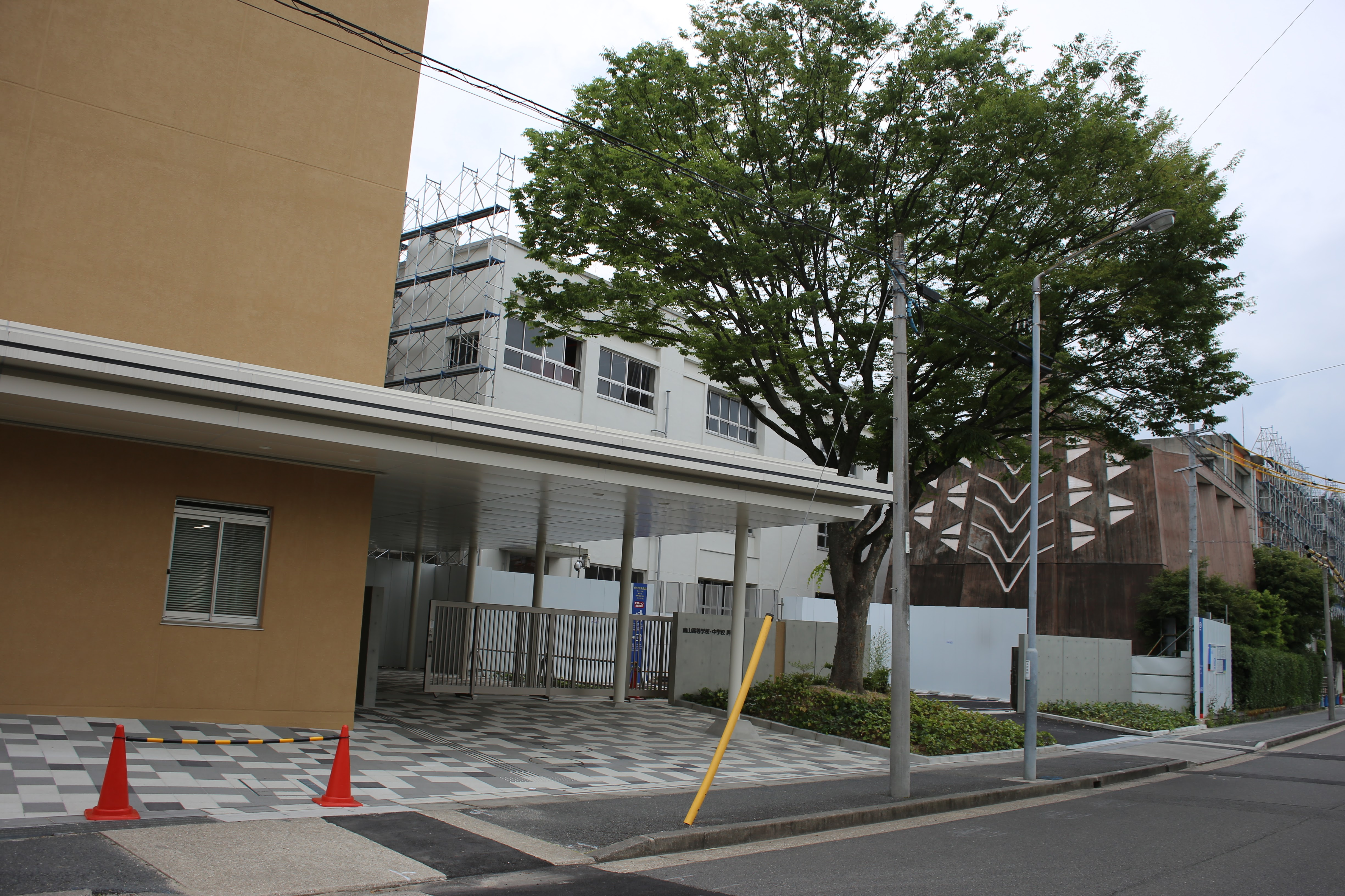 名古屋市昭和区五軒屋町 南山高等・中学校男子部